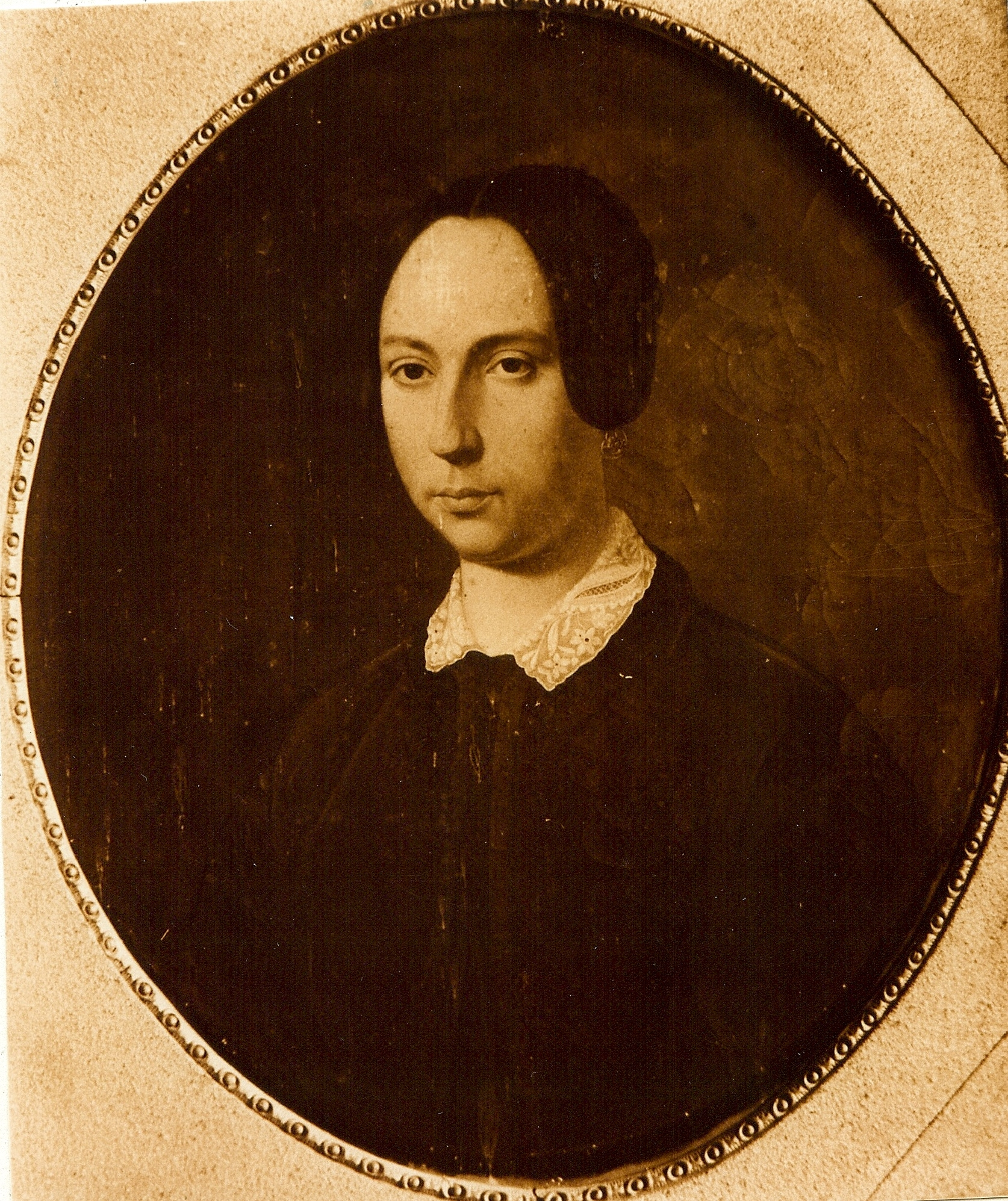 Fotografía de Pintura familiar del S. XVIII.